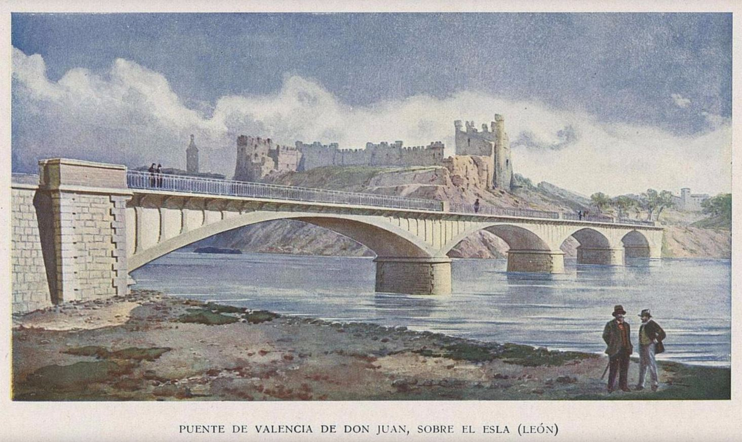 Puente de Valencia de Don Juan según dibujo del catálogo de José Eugenio Ribera